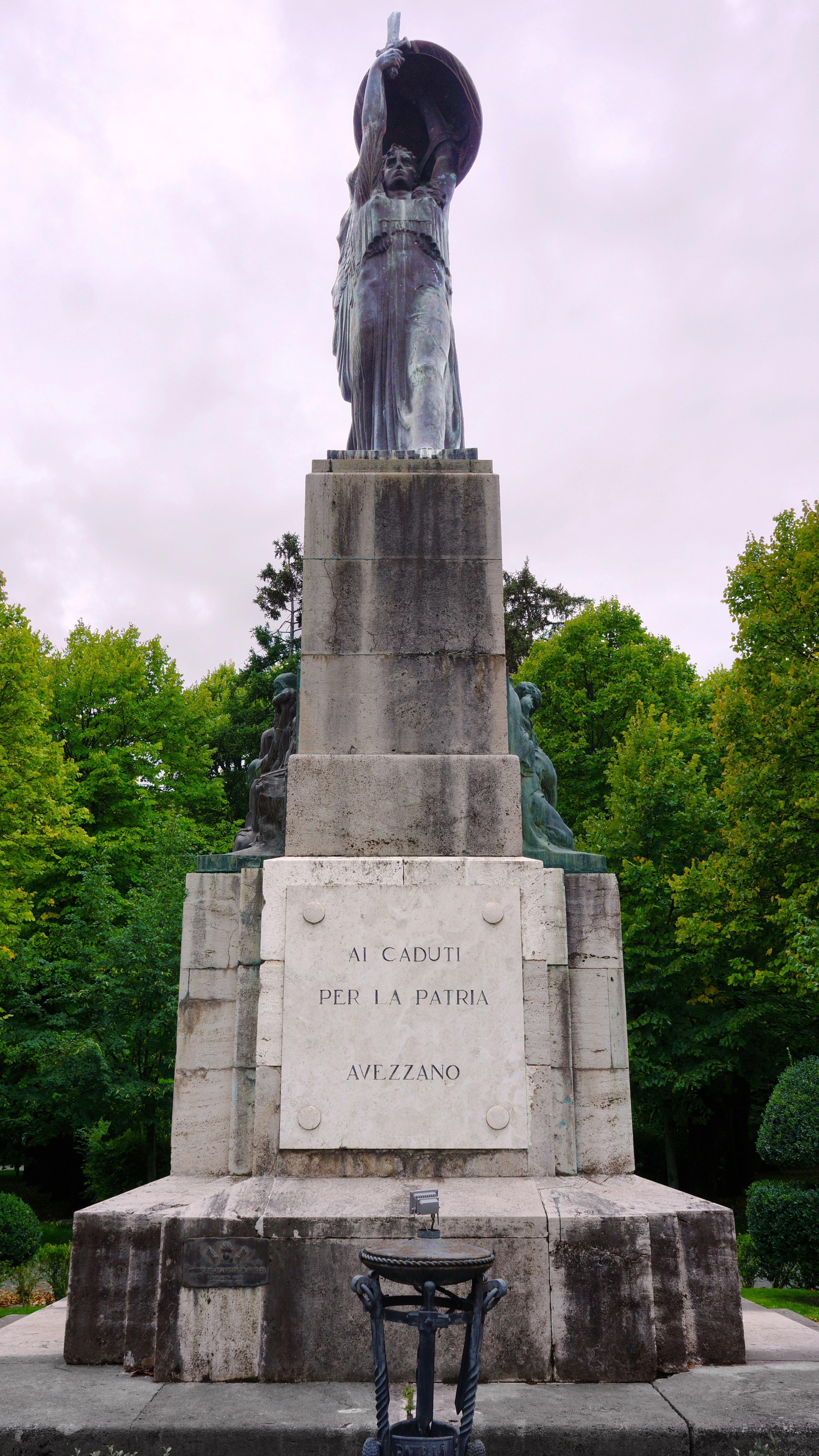 Monumento ai Caduti Avezzano 30 settembre 2015